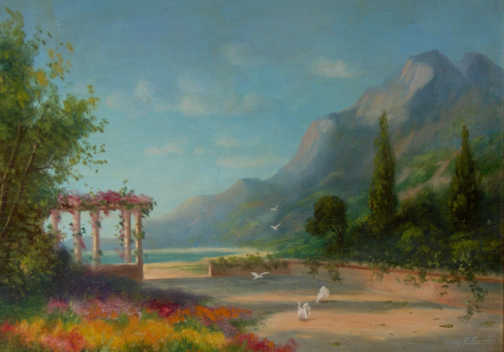 "Landschap met tortelduifjes", olieverf op paneel door Ferdinand Pauwels (1830-1904); privé bezit